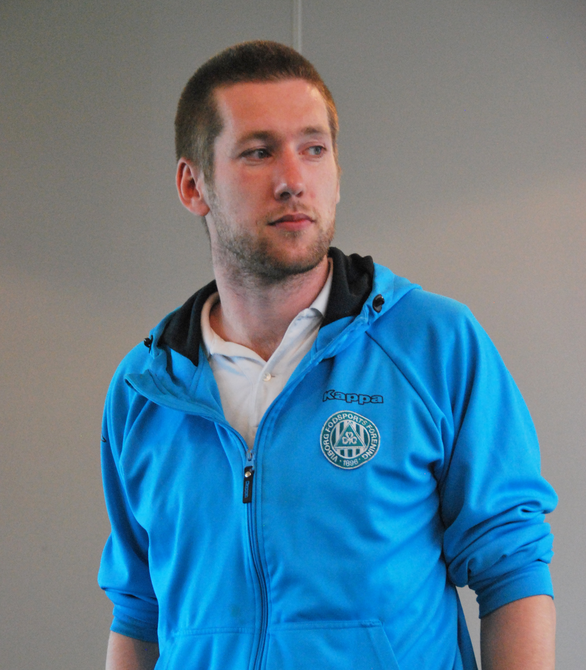 Fodboldspilleren Jesper Kjærulff fra Viborg FF. Her ved præsentation af spillertruppen for foråret 2012.